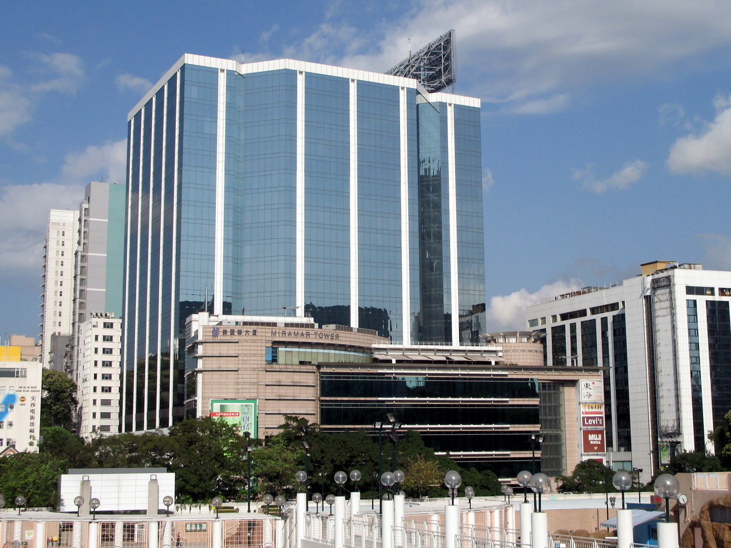 Miramar Centre 美麗華大廈